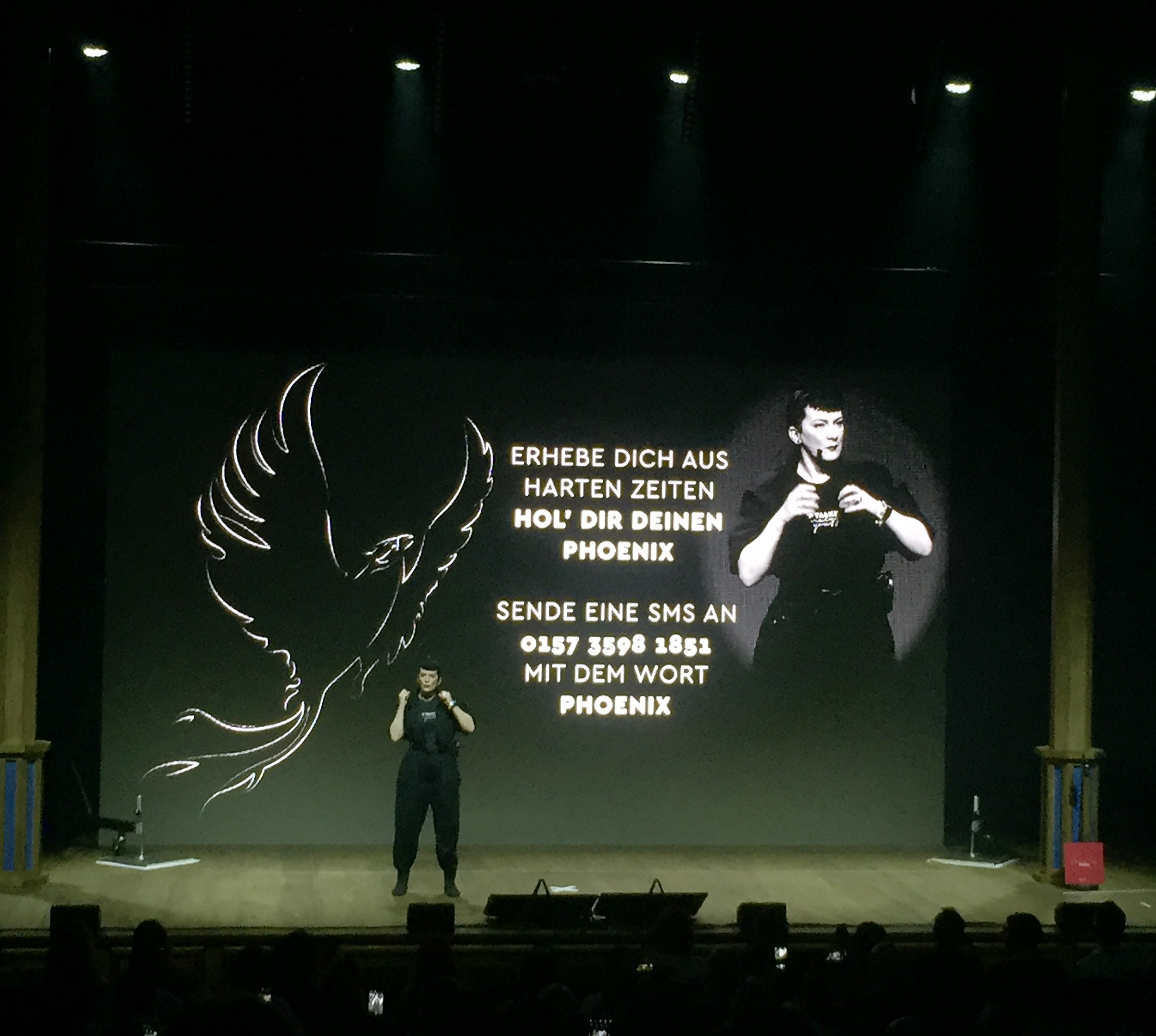 Suzanne Grieger-Langer, hier bei ihrer Bühnen­show „Cool im Kreuz­feuer“ in der Marx Halle in Wien, Österreich.